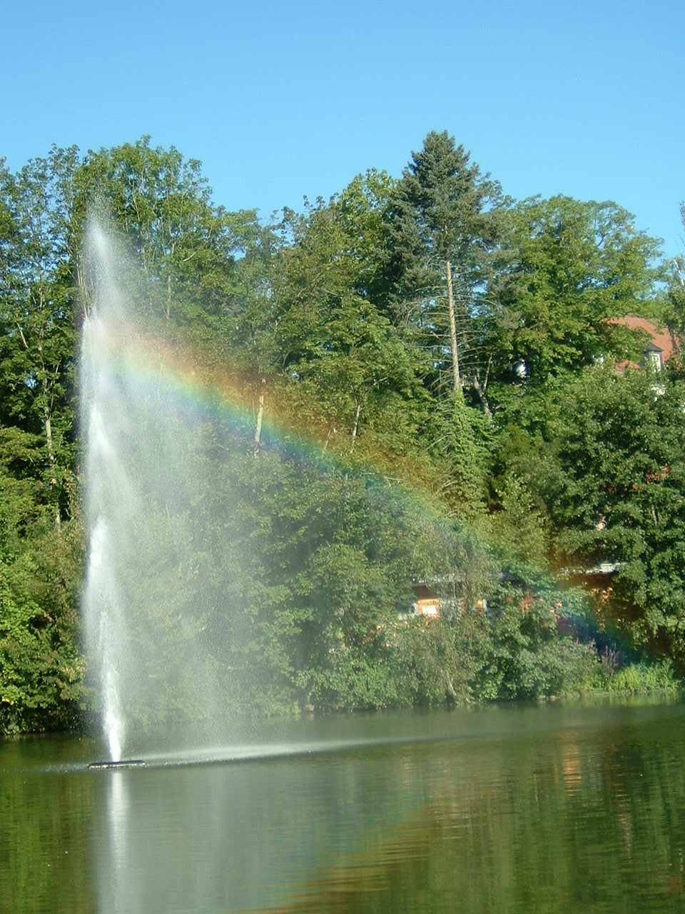 Rainbows im Kurpark Bad Nauheim